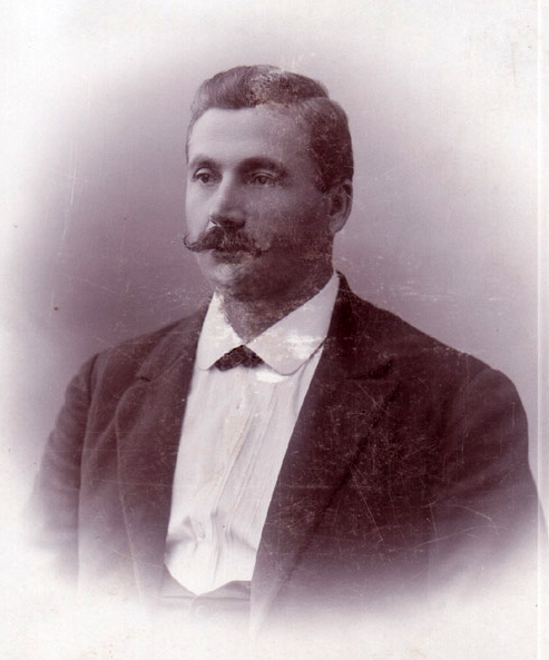 Панас Саксаганський, Полтава.